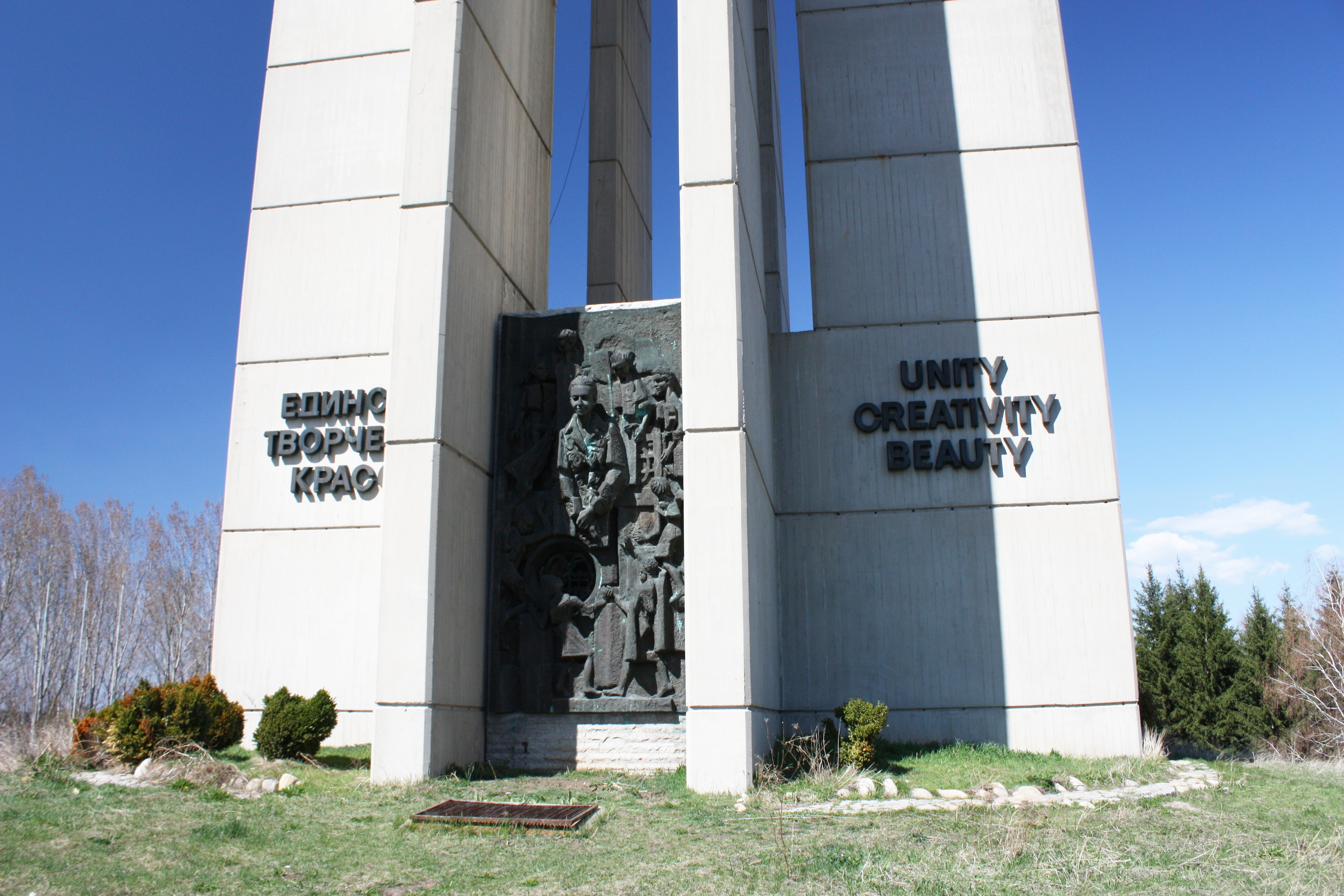 The bells, Die Glocken, Kambanite, Sofia, Bulgaria, Камбаните, София